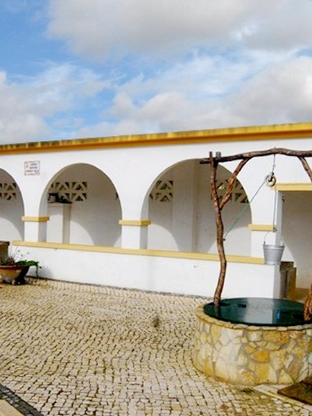 Lavadouro de Moledo